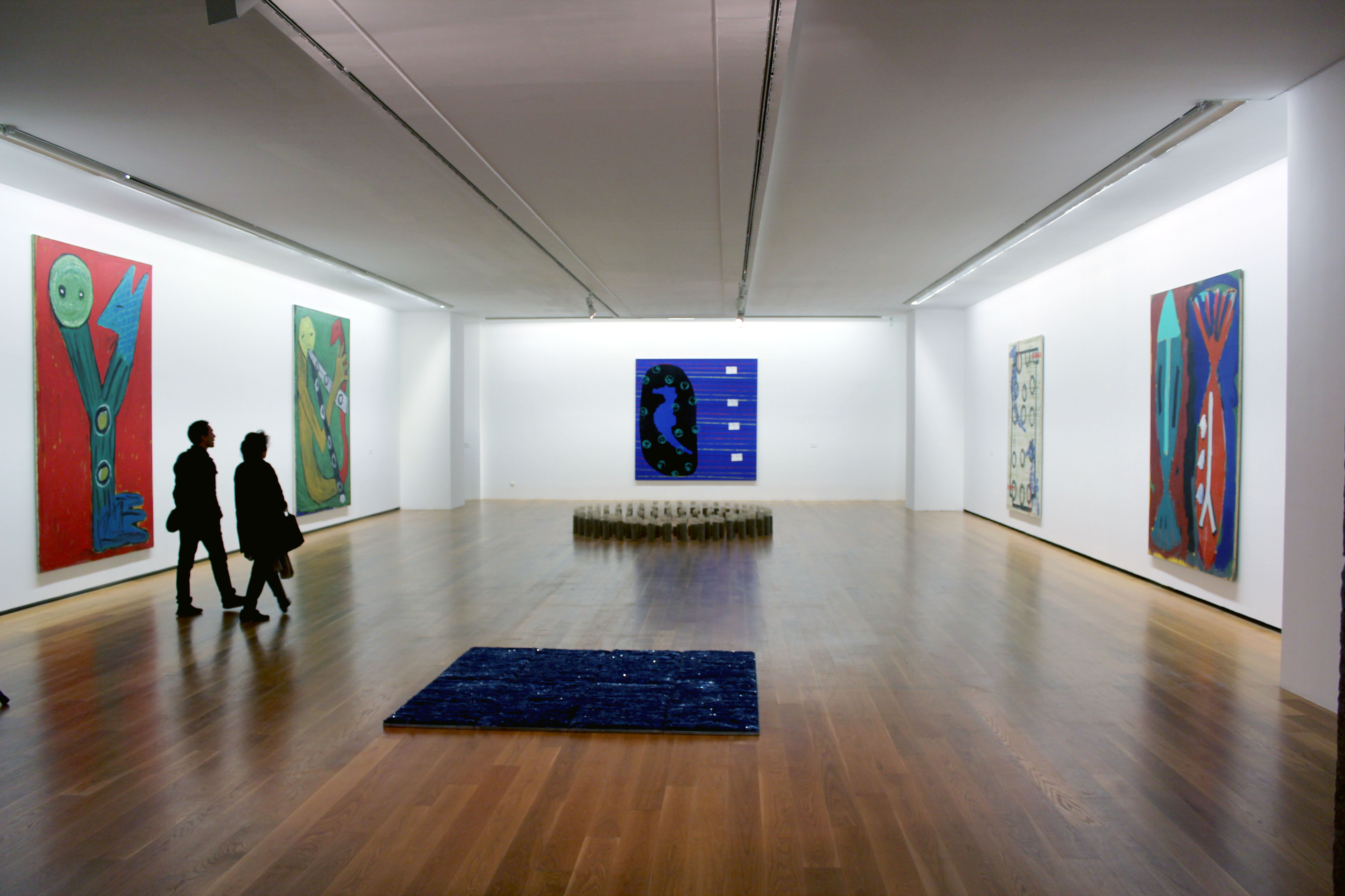 Museo MARCO Vigo